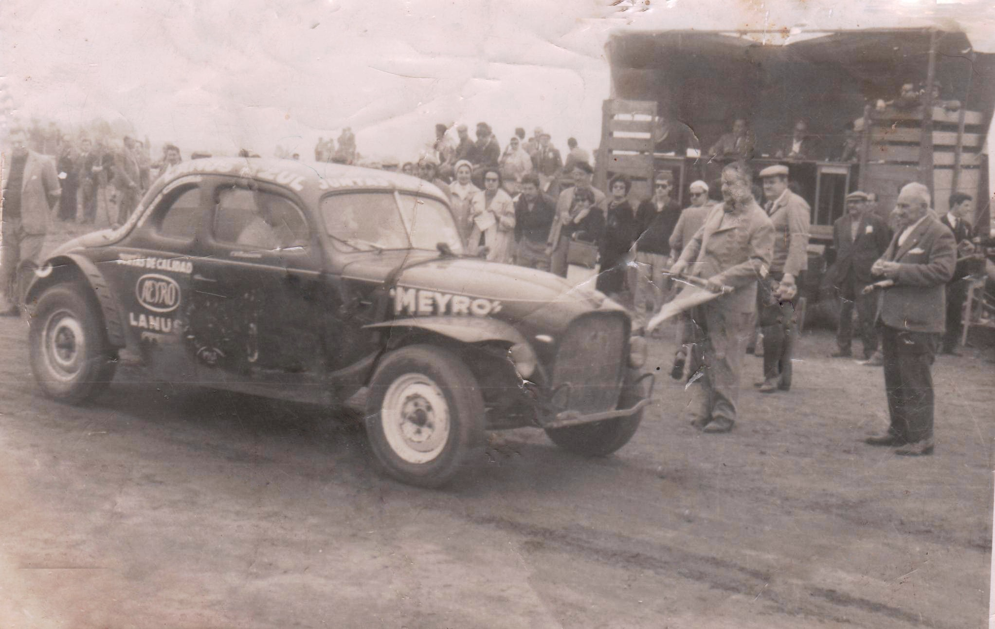 Largada de la clasificación de la Primera Vuelta Cuidad de 9 de Julio, la coupé Ford de Carlos Menditeguy, en la foto se observa a Mondelli (largando) y a Plini como asistente, ambos integrantes de la comision organizadora del evento.